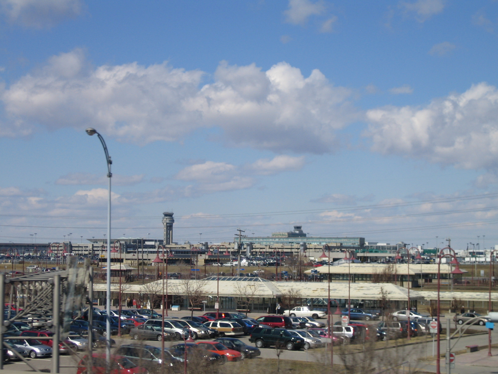 Aéroport international Pierre-Elliott-Trudeau de Montréal (photo personnel 2005)